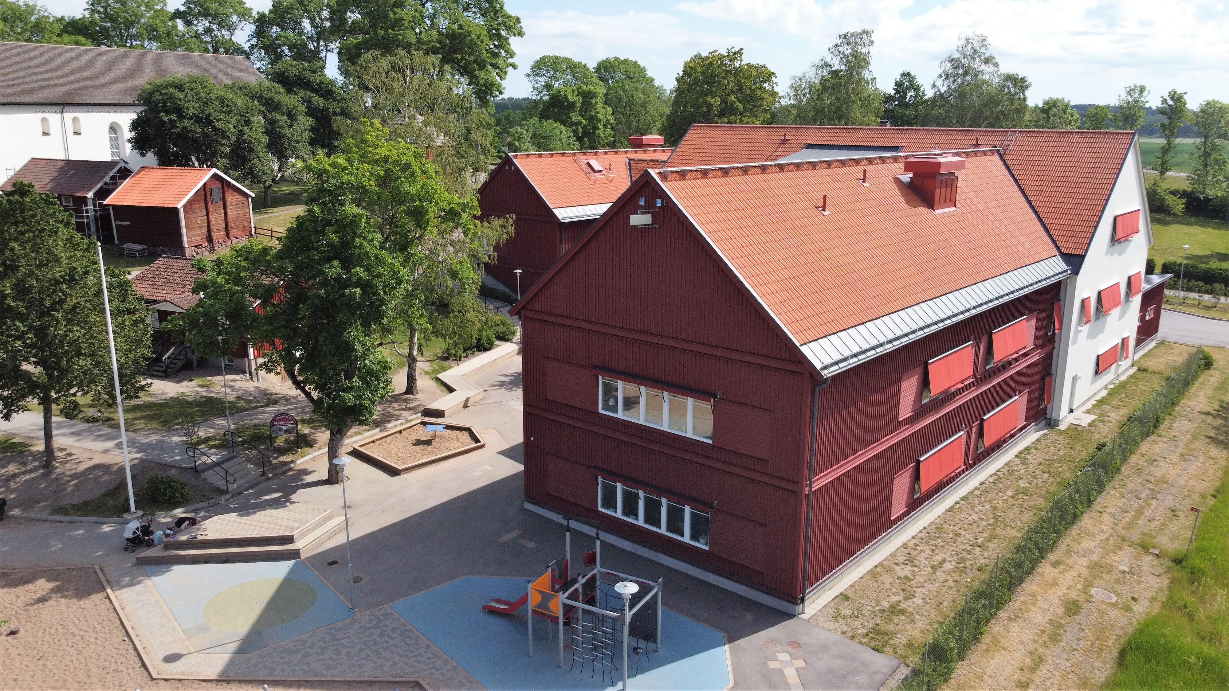 Drönarfoto över nya skolbyggnaden i Askeby (Invigd 2016).